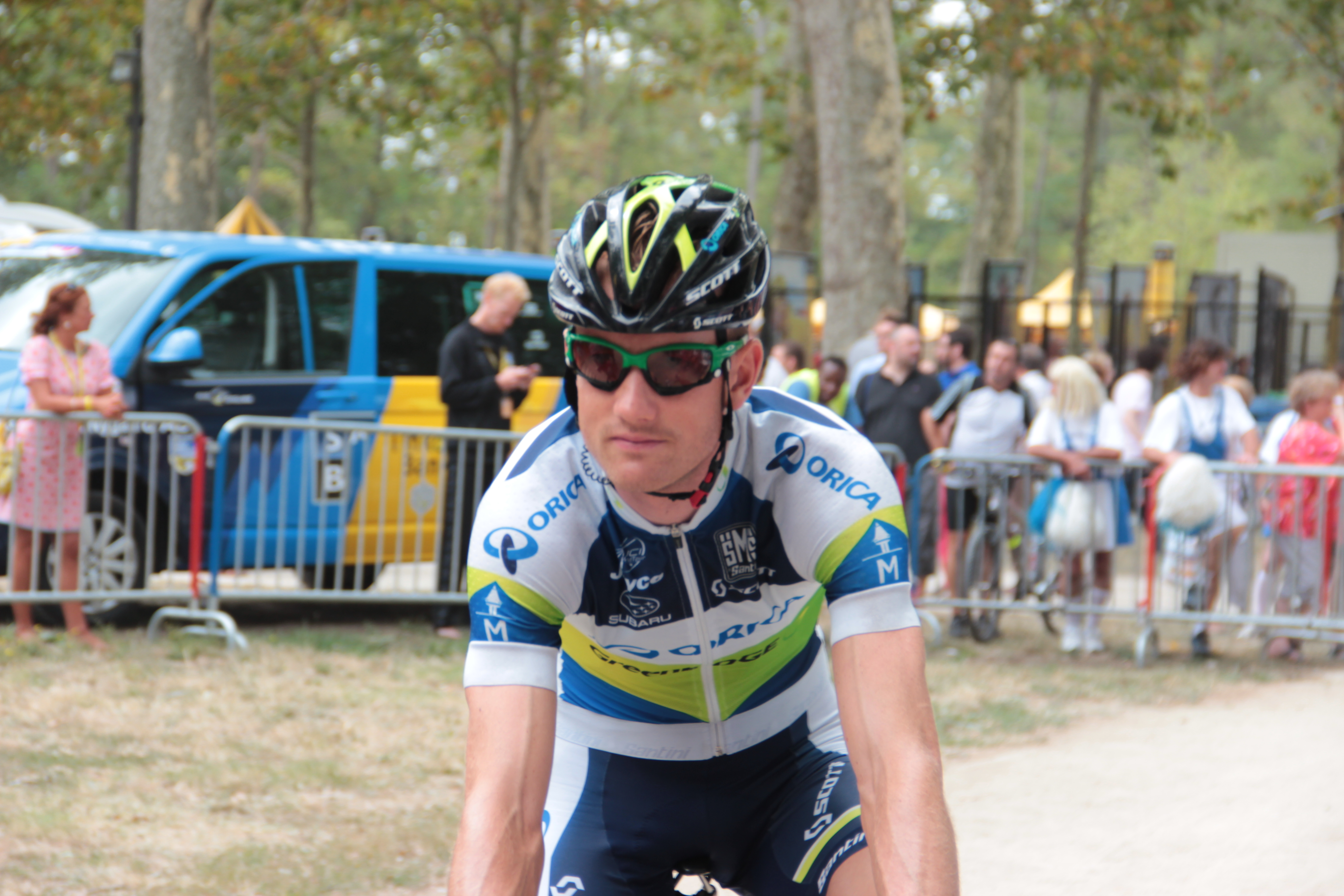 Pieter Weening avant le départ de la 18e étape du Tour de France 2012.